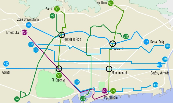 +Fase 2 XOAB